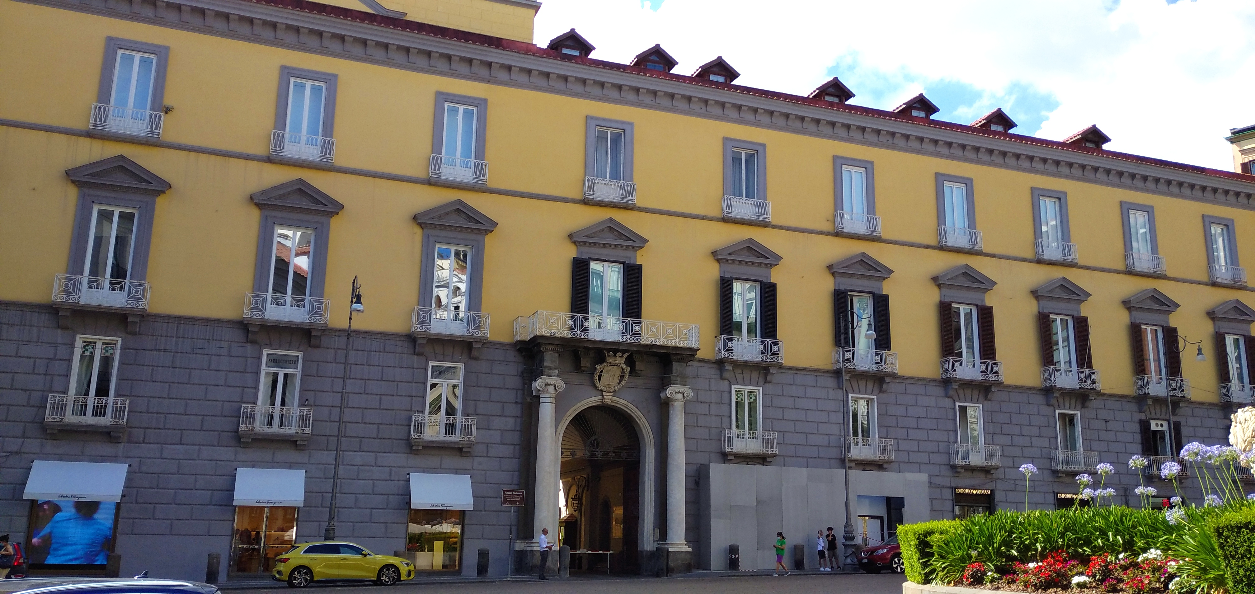 Palazzo monumentale